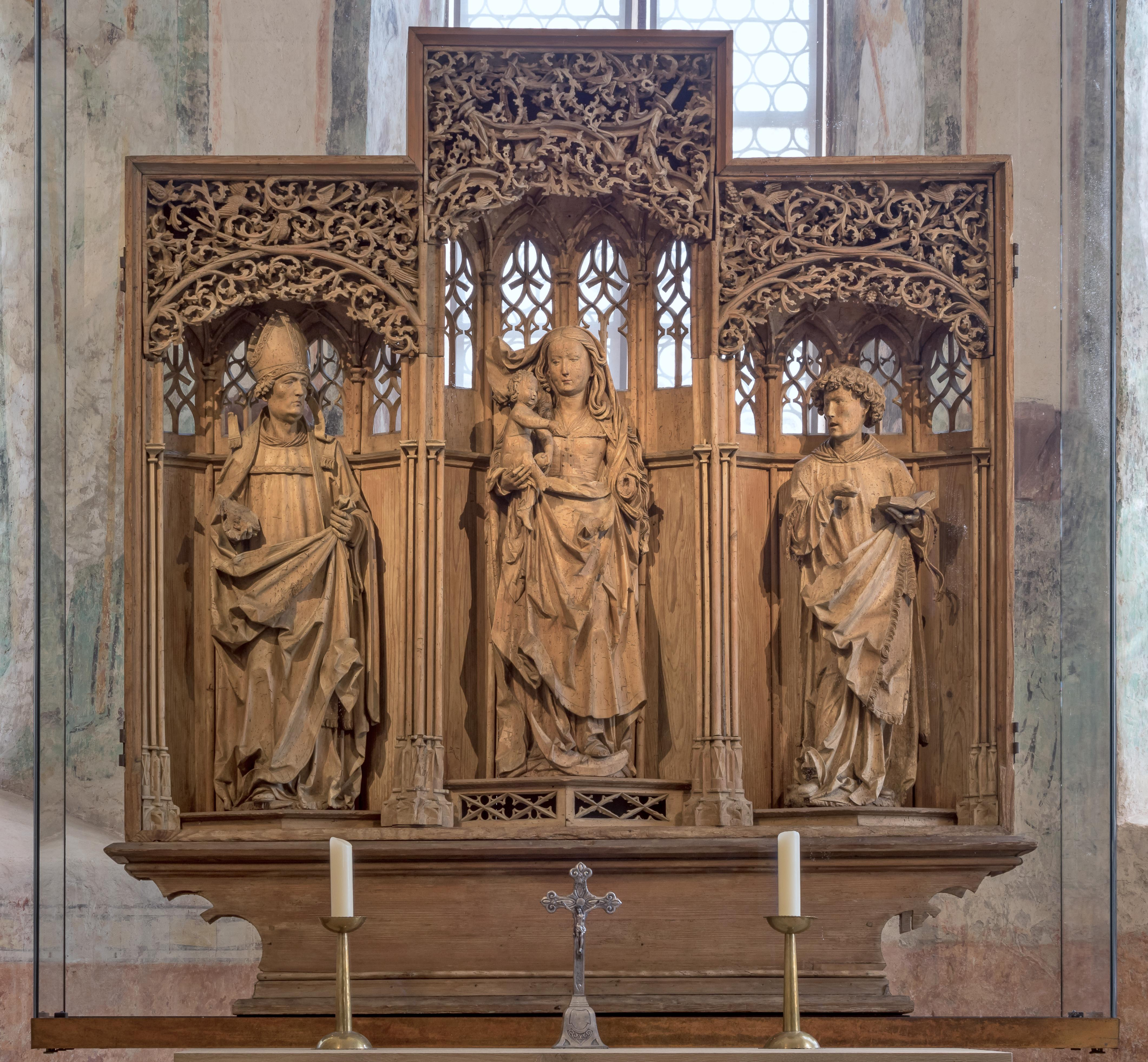 St. Vitus in Wasenweiler liegt zwischen Wasenweiler und Ihringen Errichtet wurde sie 1492 und im 17. Jahrhundert umgebaut. Sie gehörte ursprüngliche dem Deutsch Orden. Es soll die Gemeindekirche Wasenweilers gewesen sein, seit dem 18. Jahrhundert ist sie die Friedhofsapelle. Im Inneren sind Fresken der Apostel und von St. Vitus und ein prächtiger geschnitzter Alter Sie wurde erbaut um 1480 und war eine ehemalige Kirche des Deutsch-Ordens. Im Volksmund wird sie Peschdkirche genannt. Im Innern sind einige kunstgeschichtliche Kleinode Die Kapelle St. Vitus in Wasenweiler, errichtet 1492 Innenansicht Der geschnitzte Holzaltar Gesamtansicht